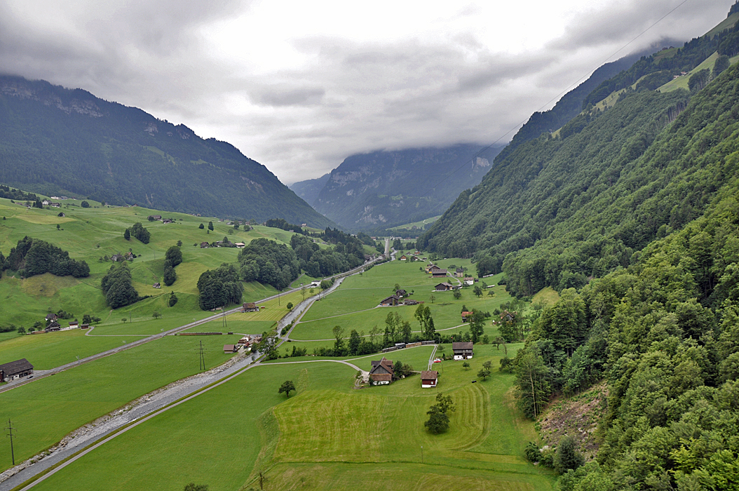 Engelbergertral, Blick Richtung Grafenort